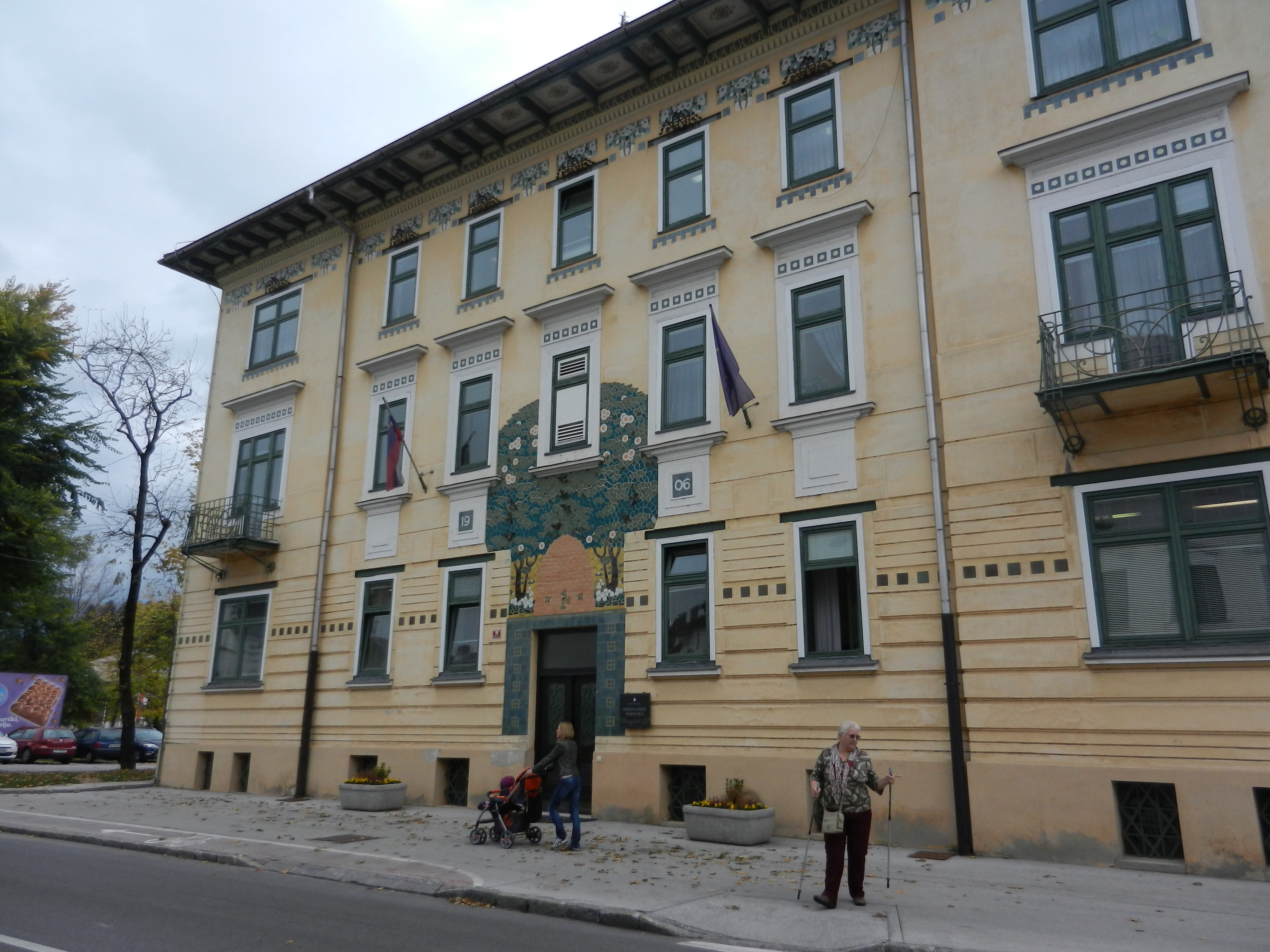 Hiša imenovana »Čebelica« v Radovljici, Slovenija. Arhitekt Ciril Metod Koch (1867-1925).